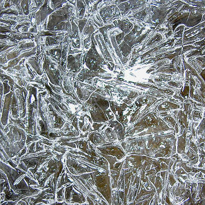 Ice. Made by Walter J. Pilsak, Waldsassen.